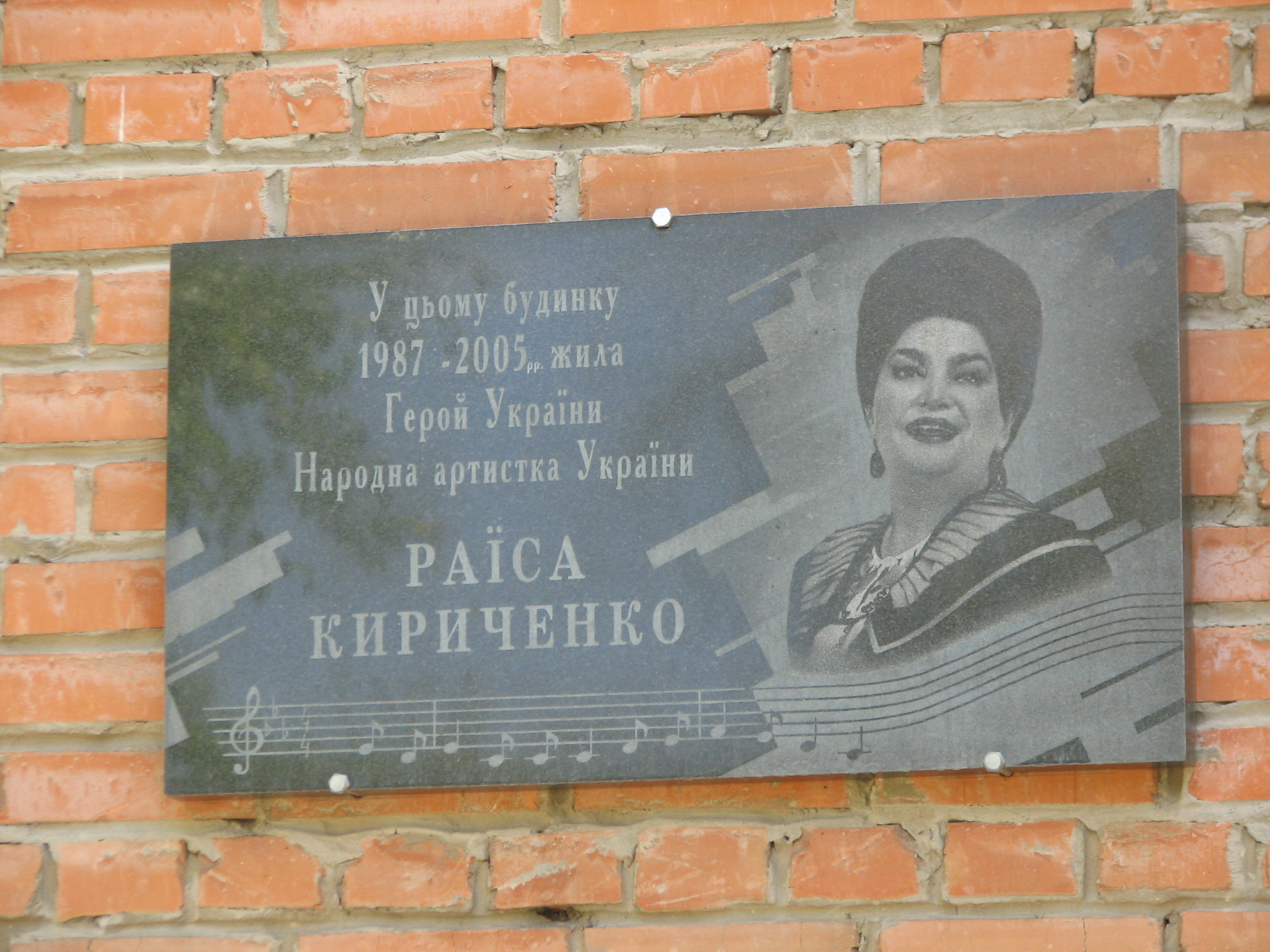 В цьому будинку жила 1987-2005 Раїса Кириченко